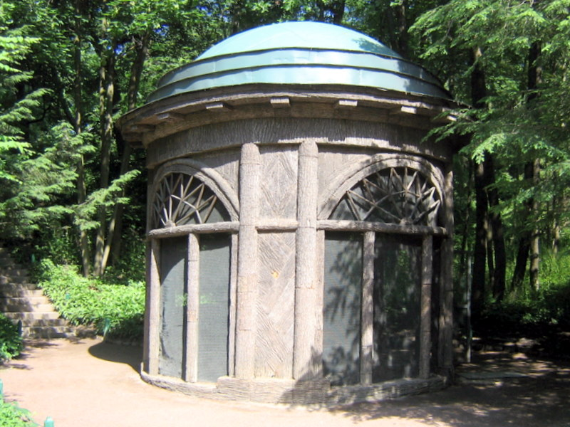 Фазанник.